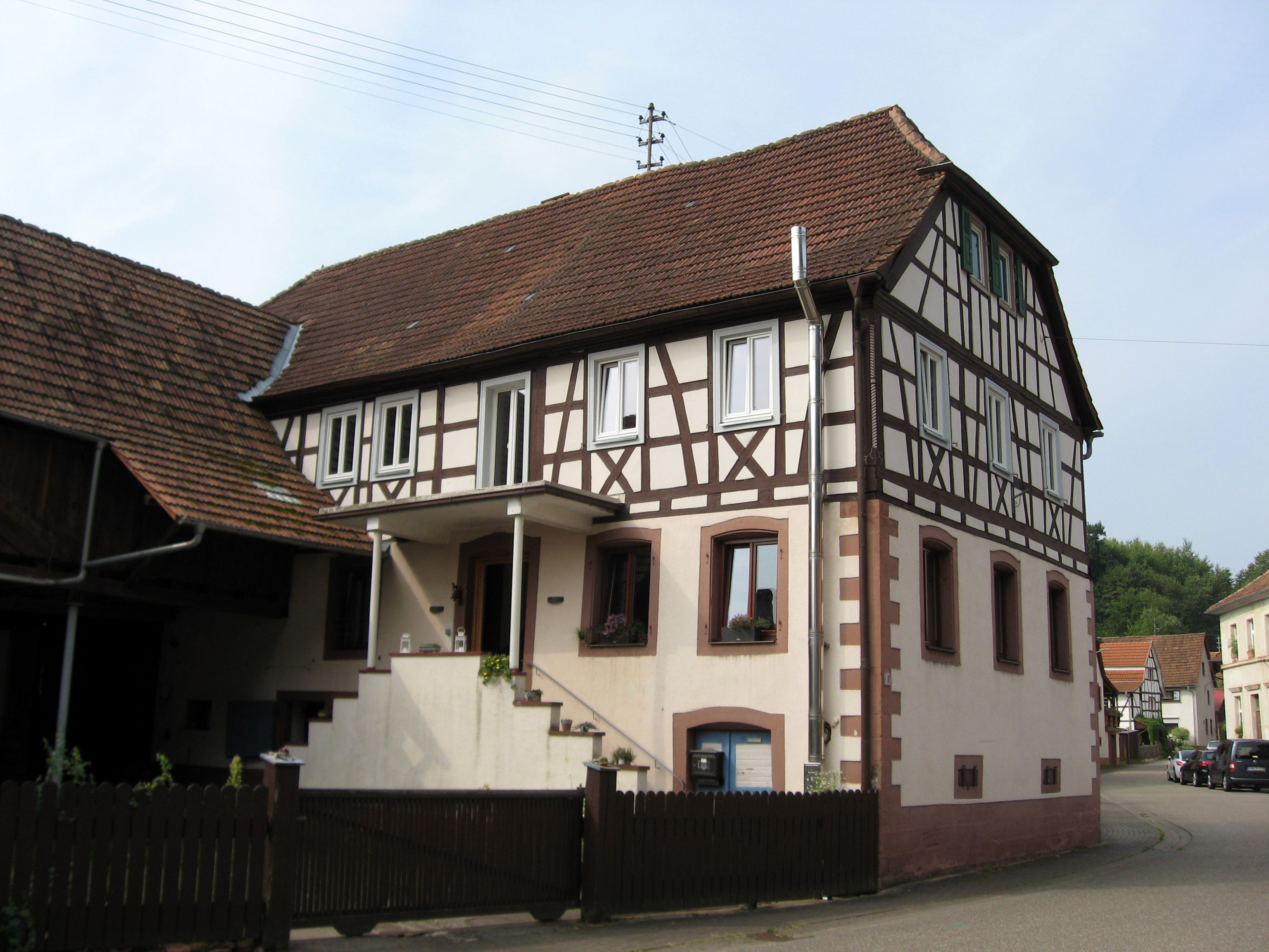 nachbarockes Fachwerkhaus August-Becker-Straße 8 in Oberschlettenbach